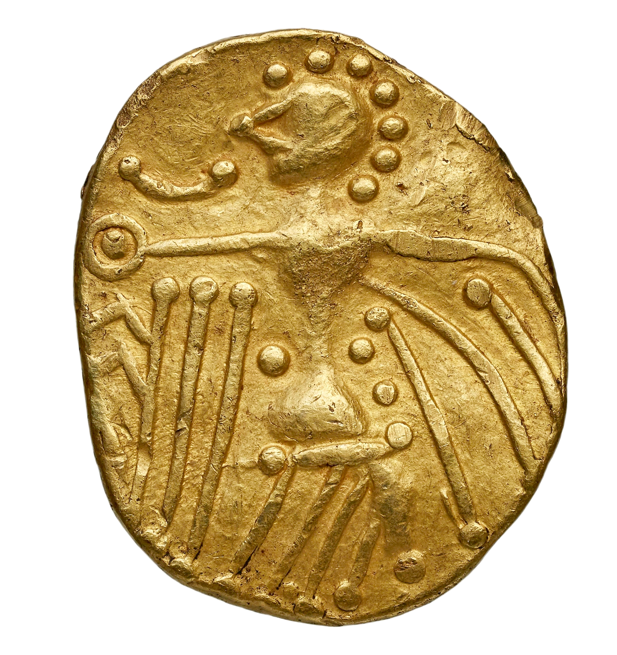 Statère des Boiens. Revers : Personnage debout, lignes et globules dans le champ. Or, 5,95 gr. Environ 17x21 mm. -200. Collection Bnf : 9369A (GAU-9837)